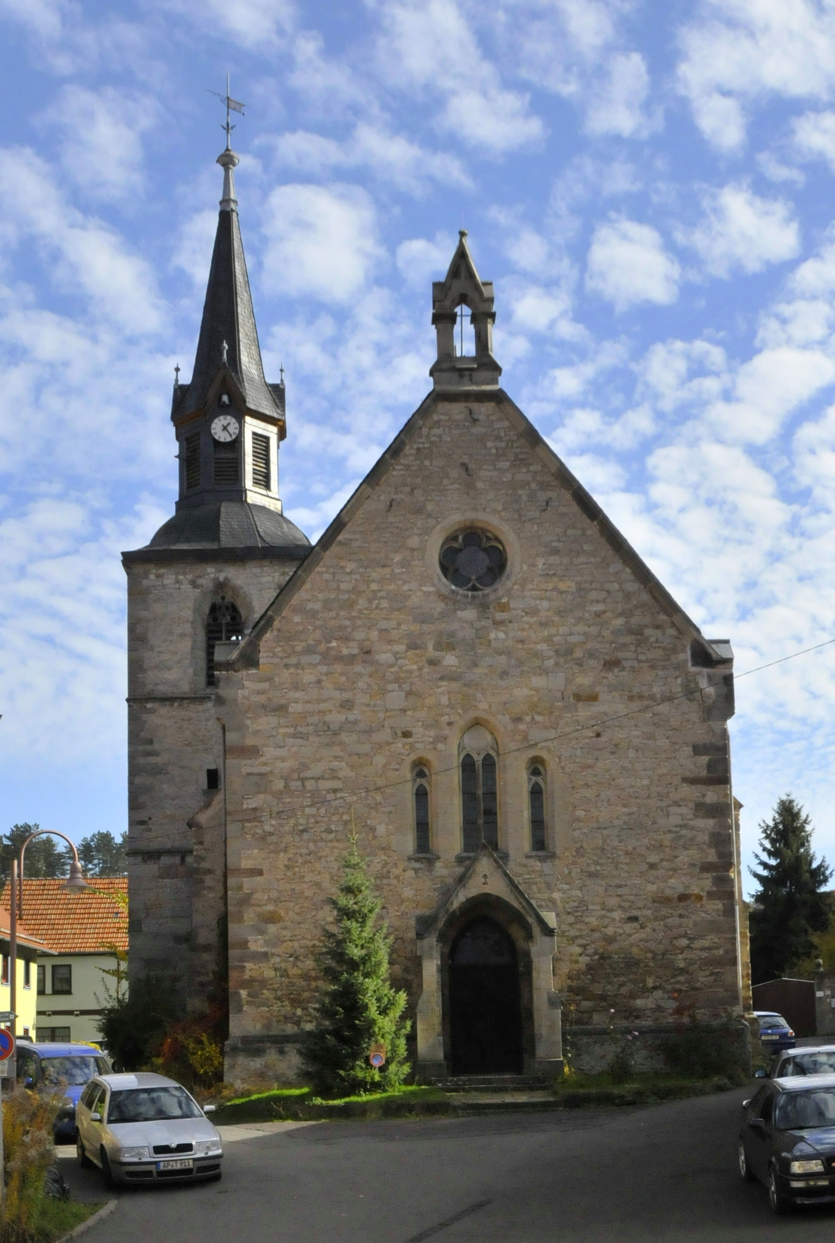 Kranichfeld, Kirche